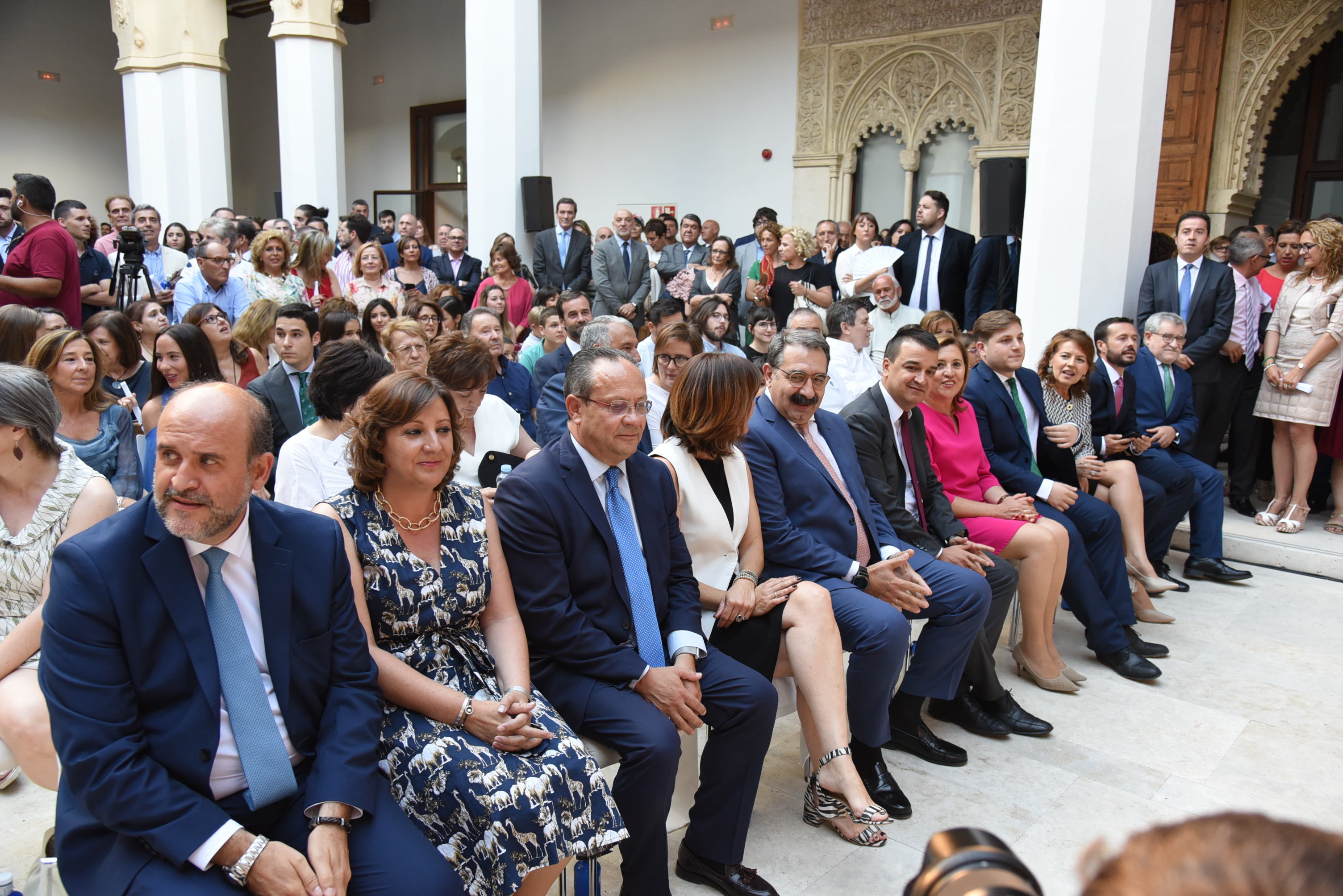 Toledo, 8 de julio de 2019.- Acto de toma de posesión del nuevo Gobierno de Castilla-La Mancha. (Foto: José Ramón Márquez // JCCM)